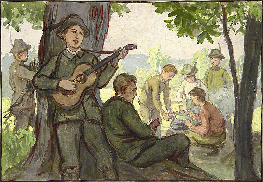 Gitarrenspieler und weitere junge Personen (im Umkreis der Jugendbewegung/des Wandervogel?), unbekannter Künstler, Anfang 20. Jh., Mischtechnik auf Malpapier